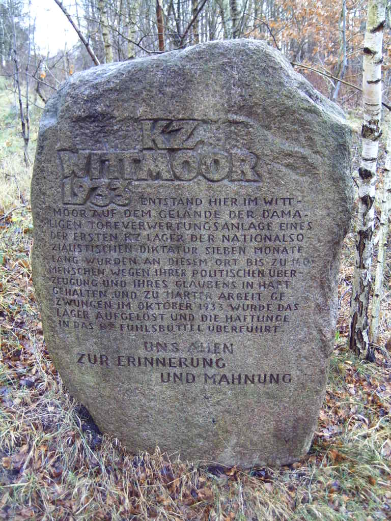 Gedenkstein KZ Wittmoor (Hamburger Seite in Lemsahl-Mellingstedt)